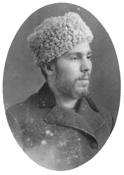 Стефан Стамболов (1854-1895)